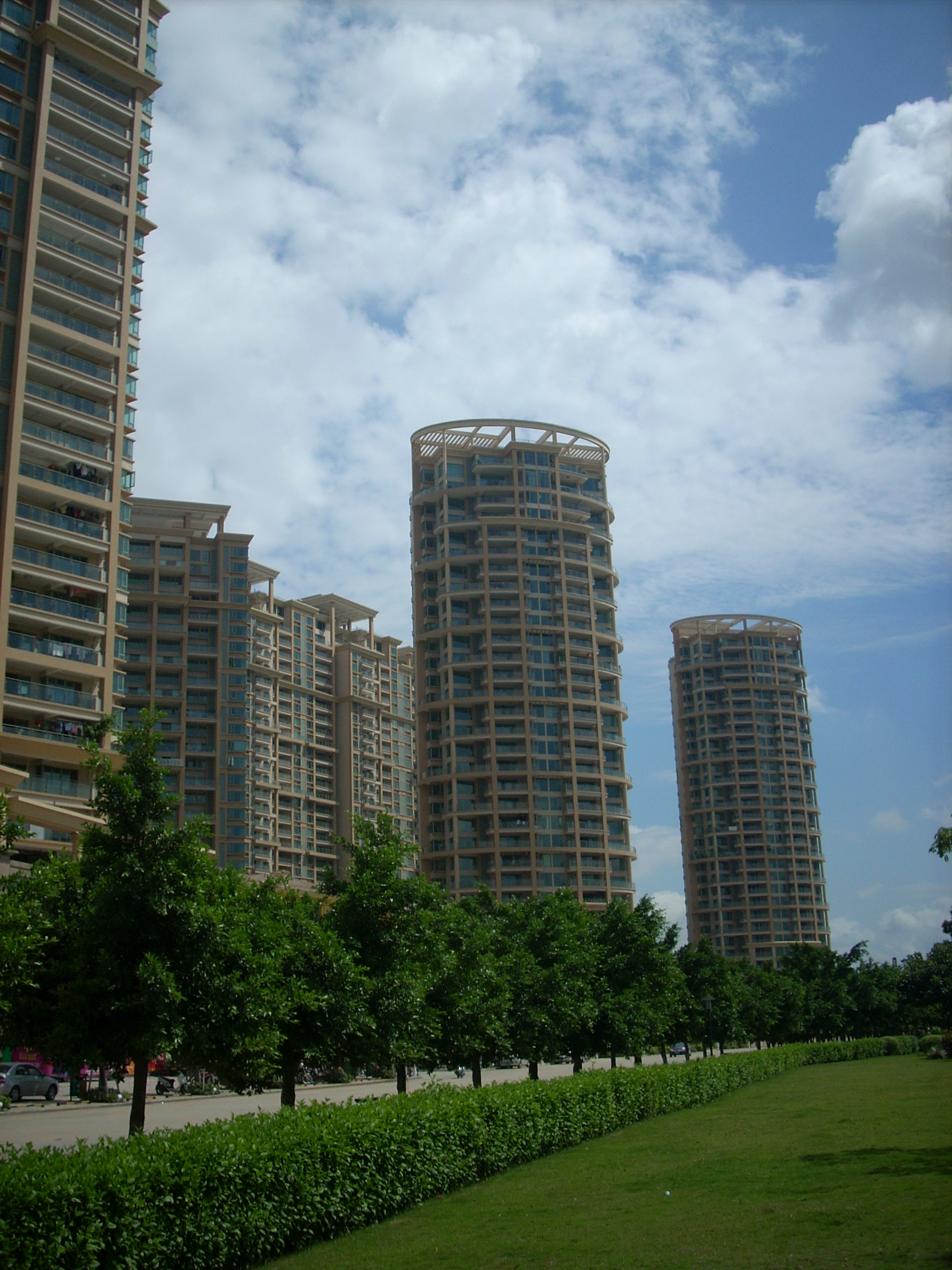 东江首府住宅区